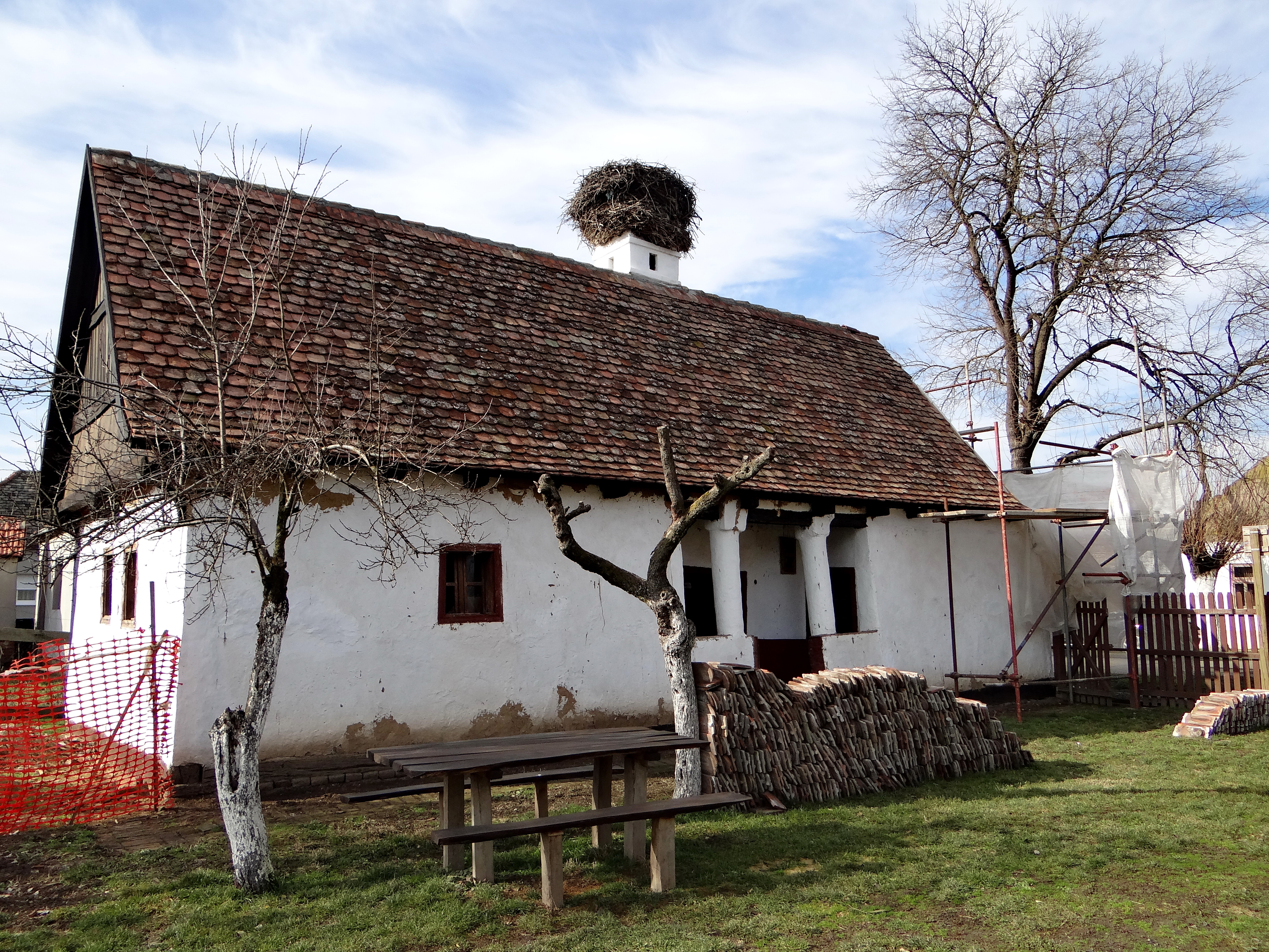 Seoska kuća u Ogaru